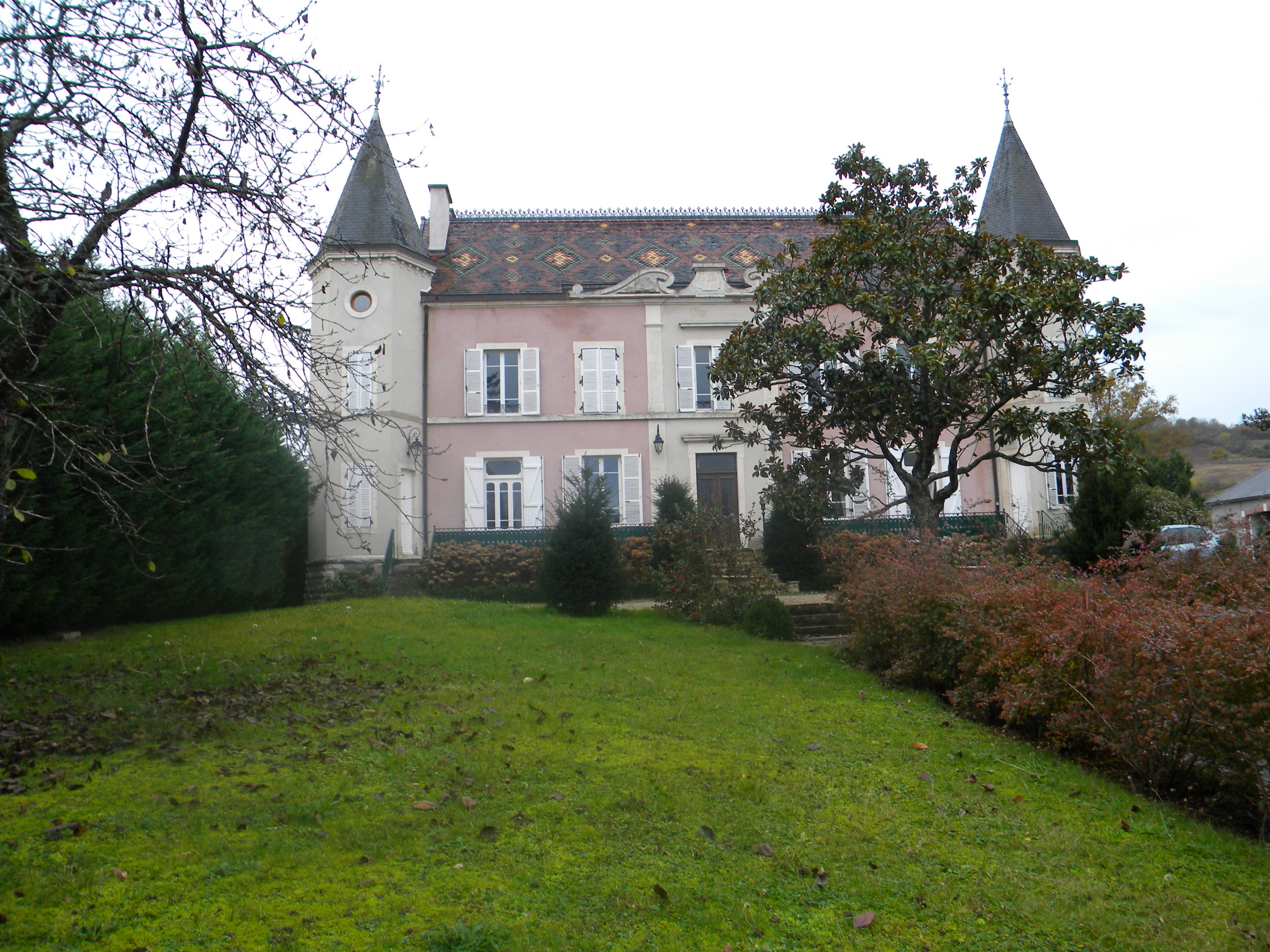 Kastelo de Paris-l'Hôpital